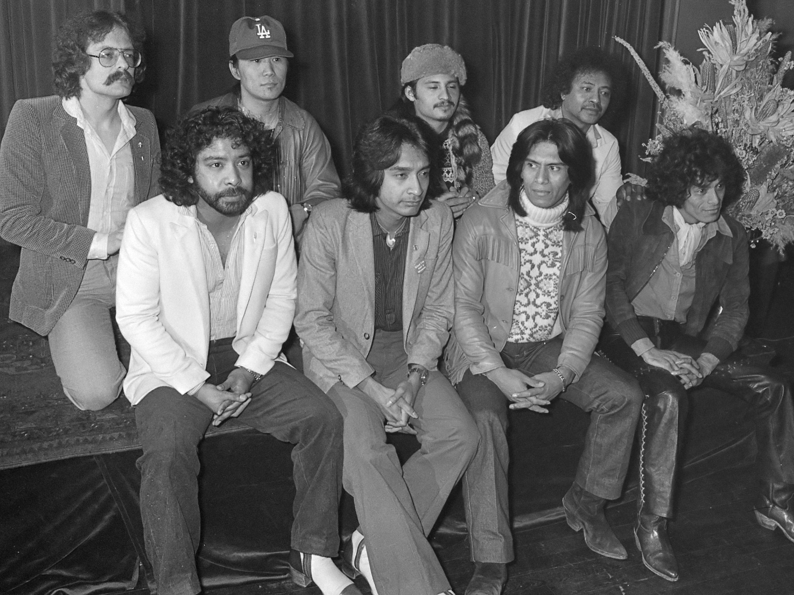 Uitreiking Zilveren harpen 19 maart 1979